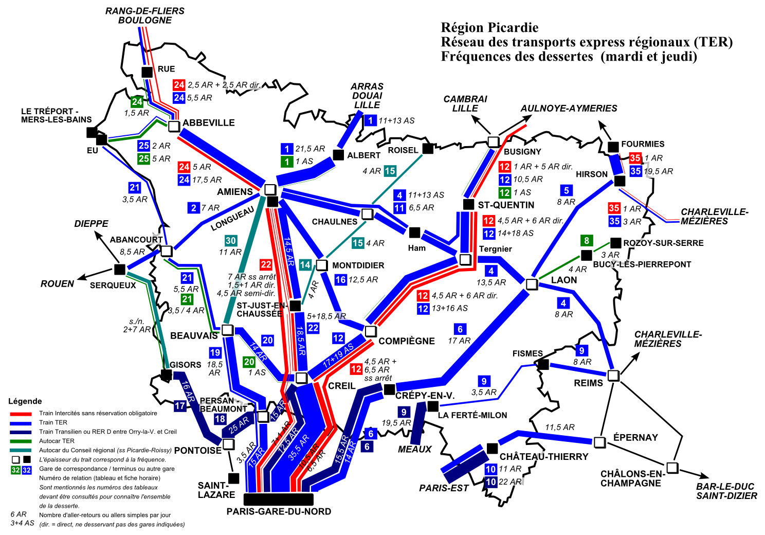 TER Picardie, fréquence de la desserte les jours-types de pleine semaine (mardi et jeudi), horaire annuel 2012.